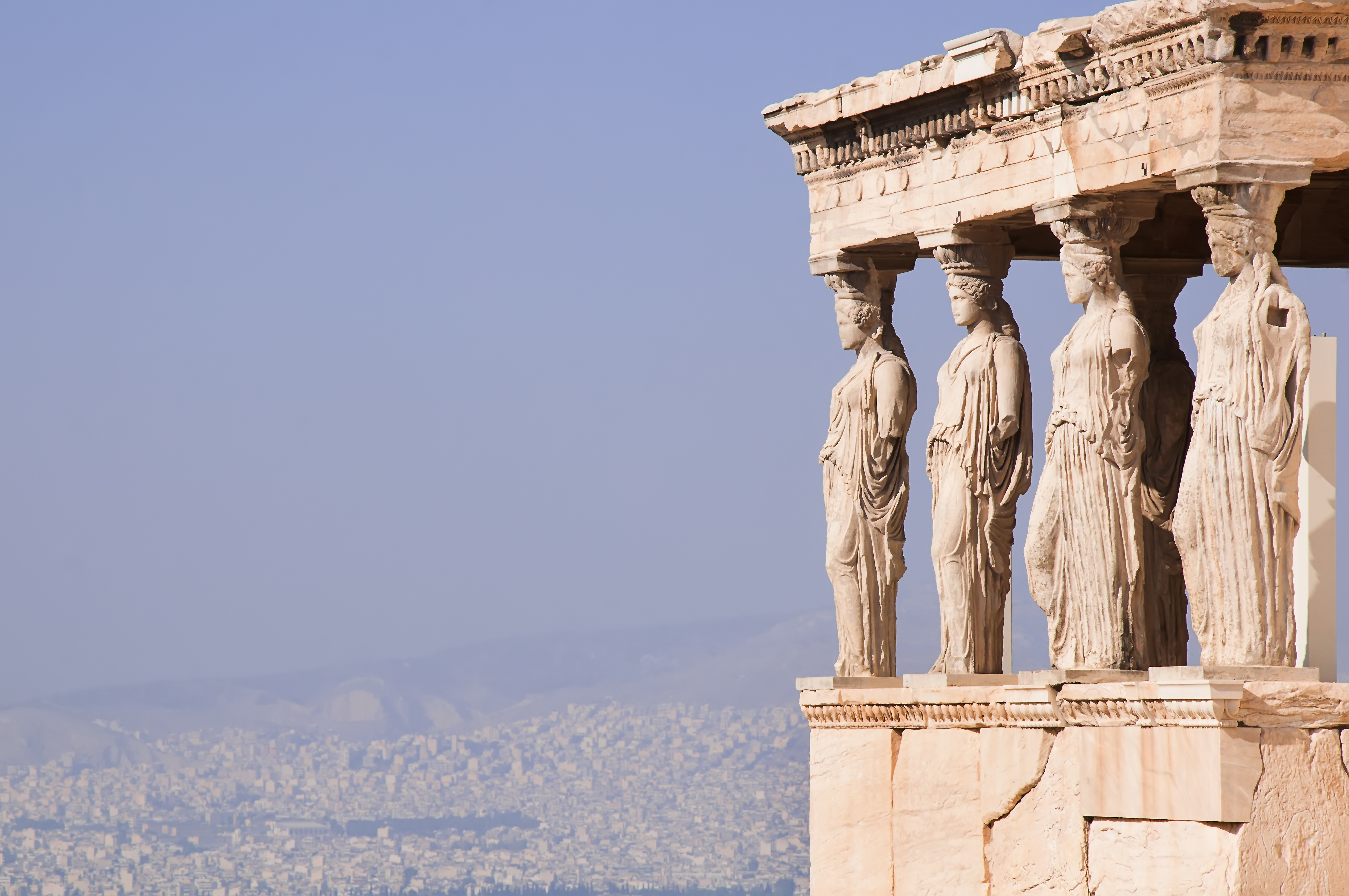 Ερέχθειο«Ερέχθειο»